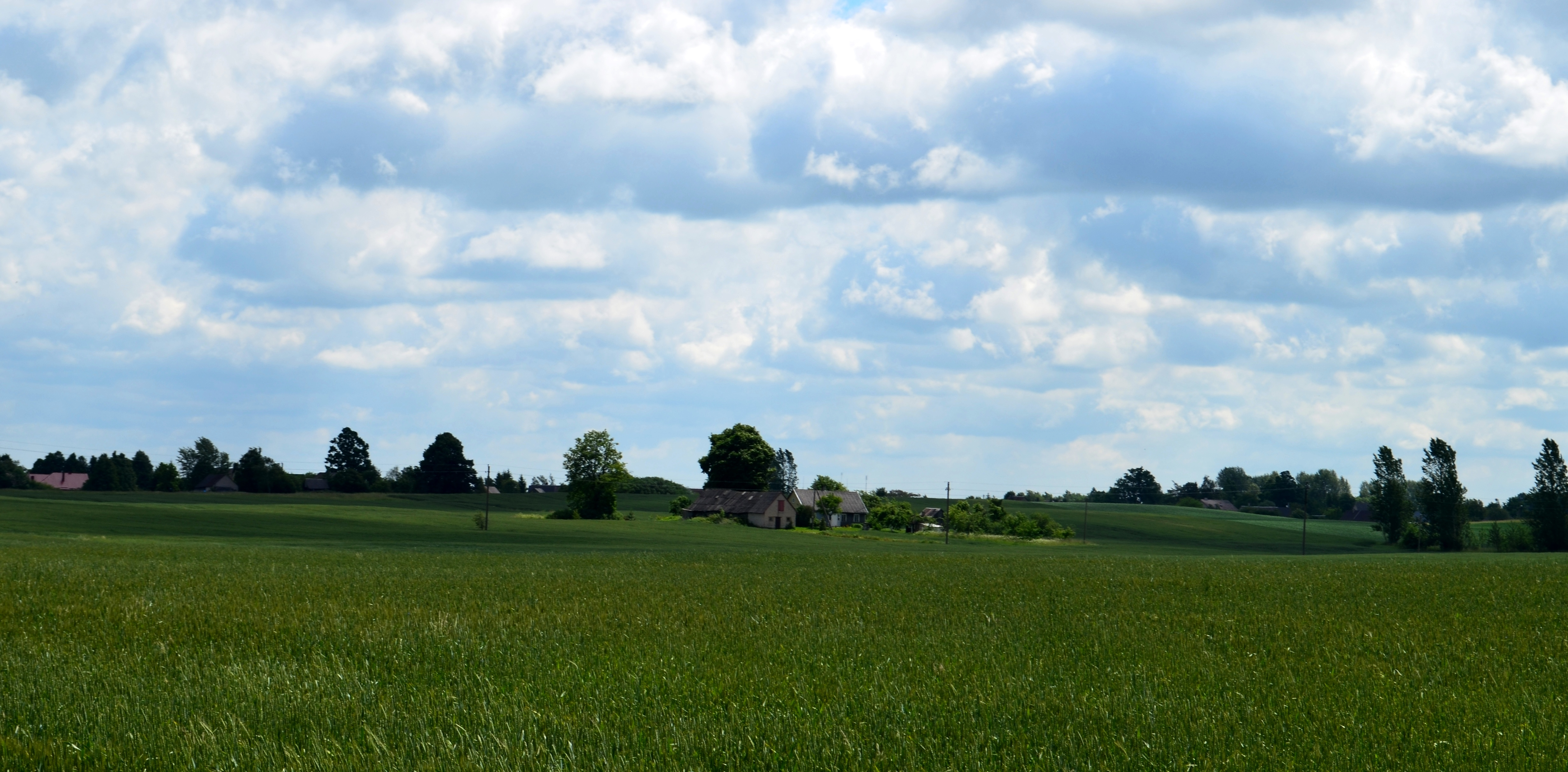 Ąžuolytė, Kėdainių raj.